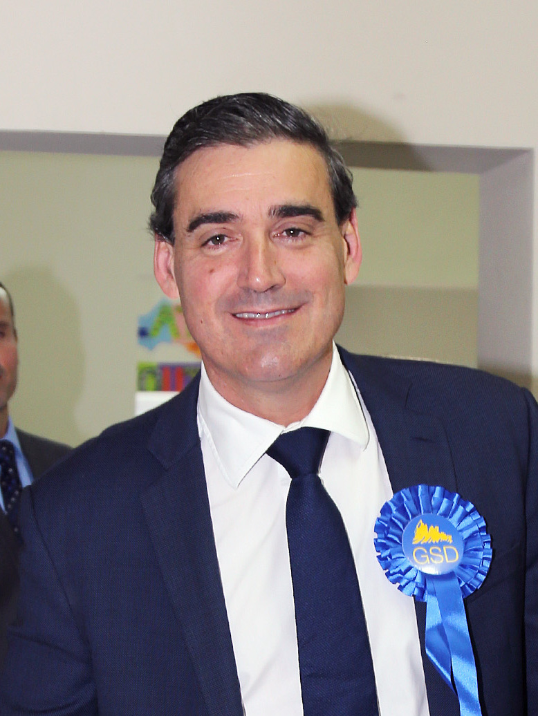 Daniel Feetham GSD